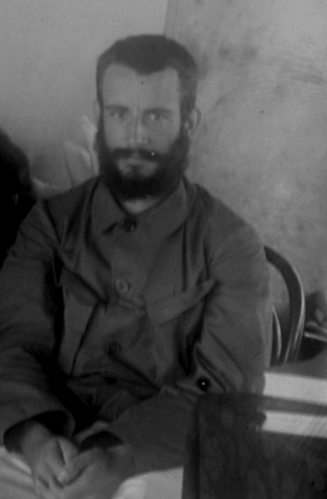 Wichmann Expeditie naar Noord Nieuw Guinea, 1903